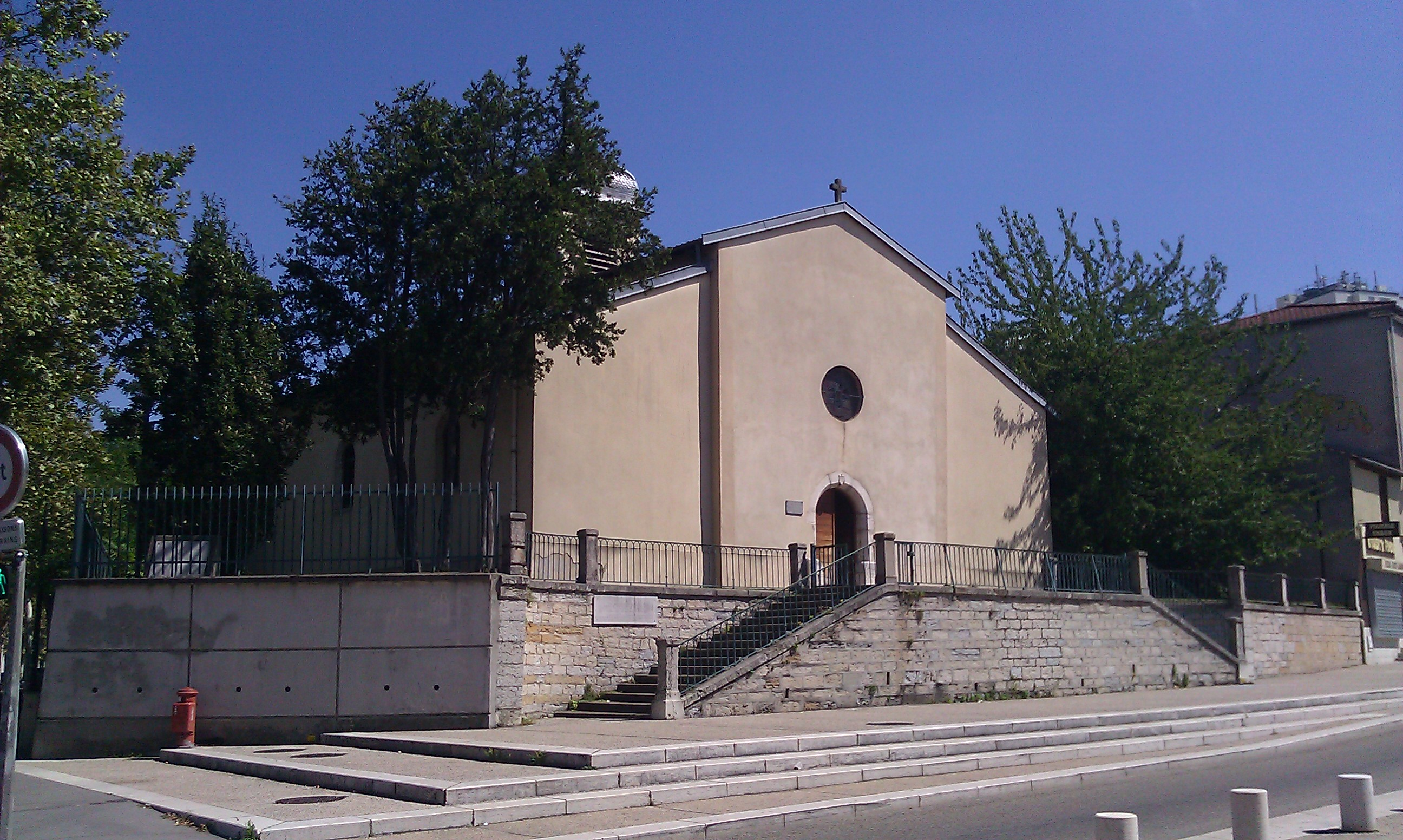 Eglise St-Anathase de Villeurbanne